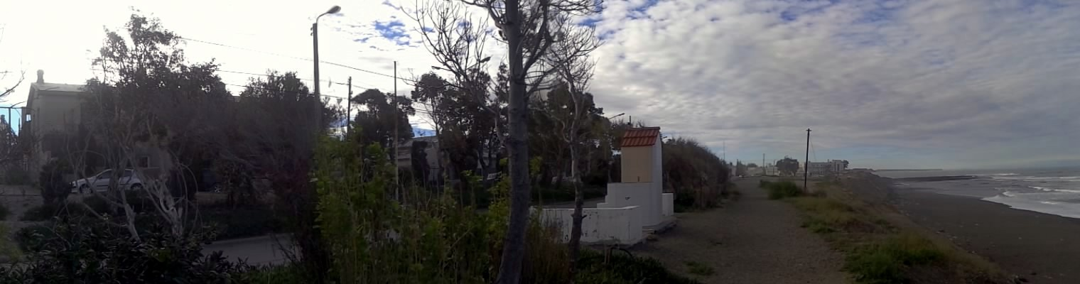 Vista actual del terreno lindante donde ayer se enclavó la estación